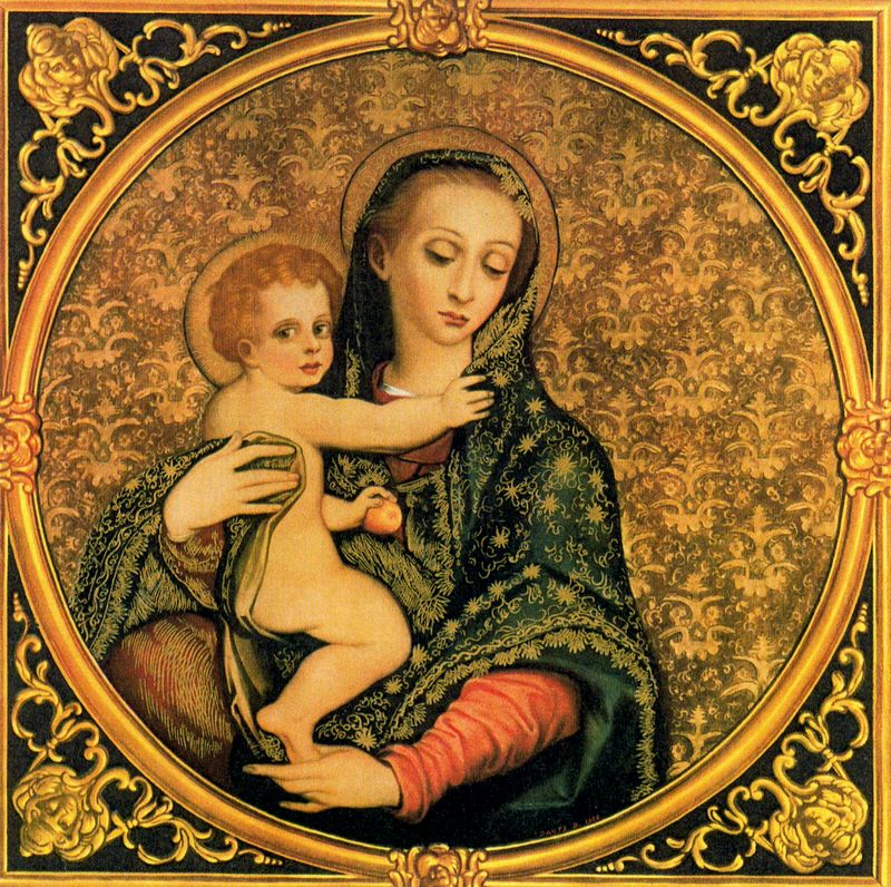 Madonna della Puritá, Pintura, técnica mixta, sobre tabla con apliques del XVIII. 92 cm. de diámetro. Basílica de San Paolo Maggiore. Nápoles. Italia.